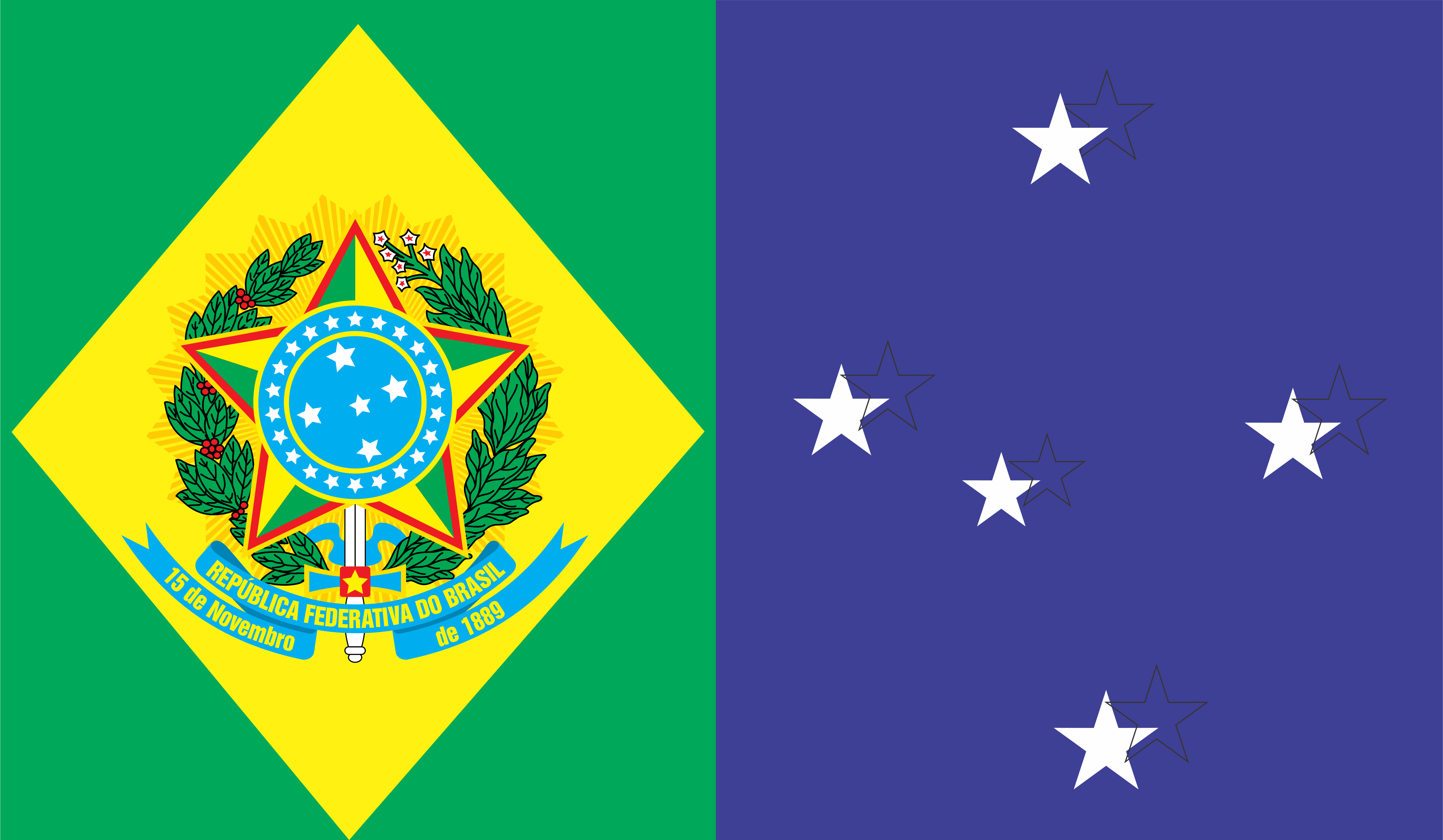 Antiga bandeira do Ministro de Estado da Aeronáutica do Brasil.